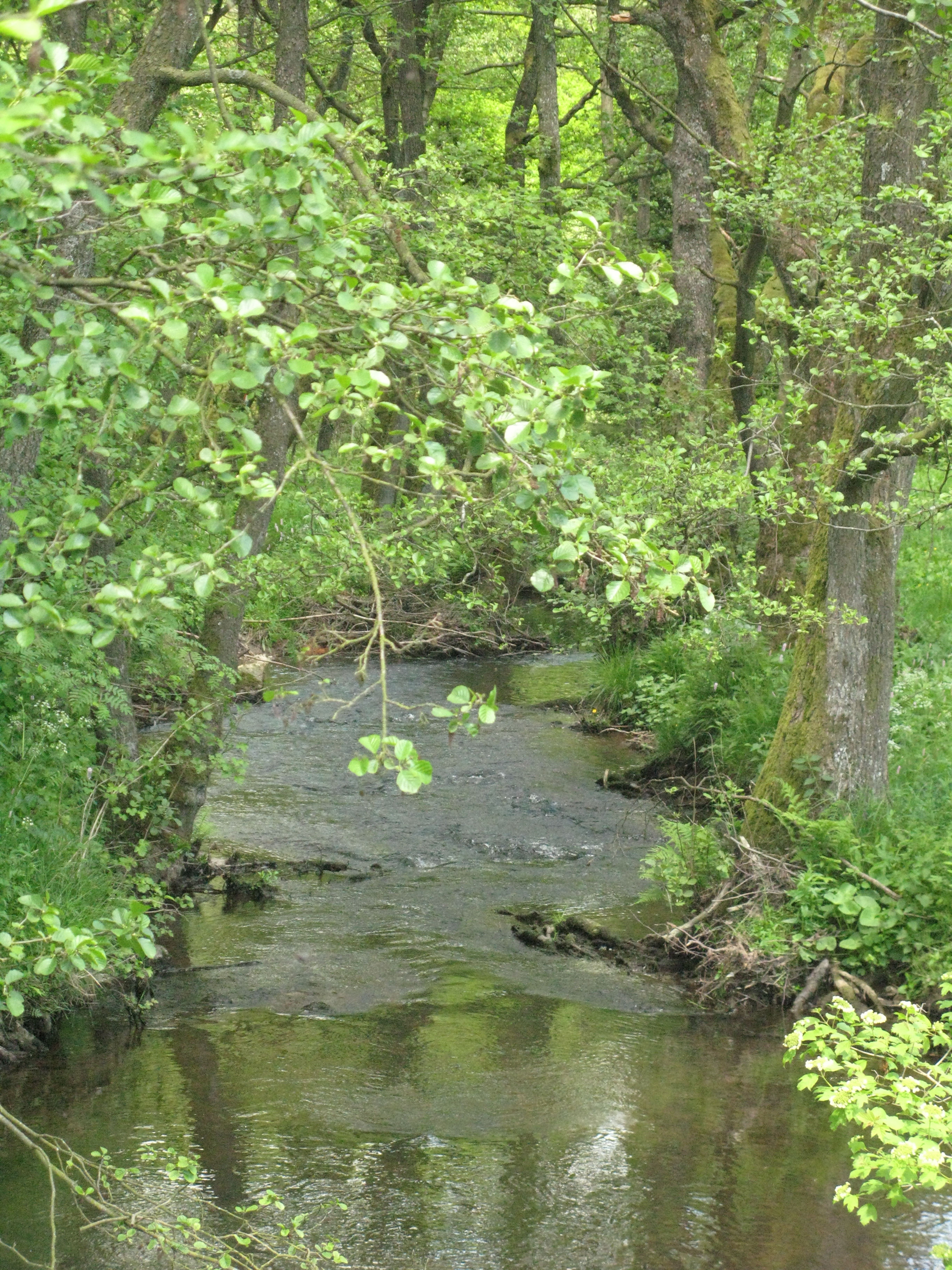 De Rechterbach eng 2 km flossofwäerts vu Recht. Rechterbach